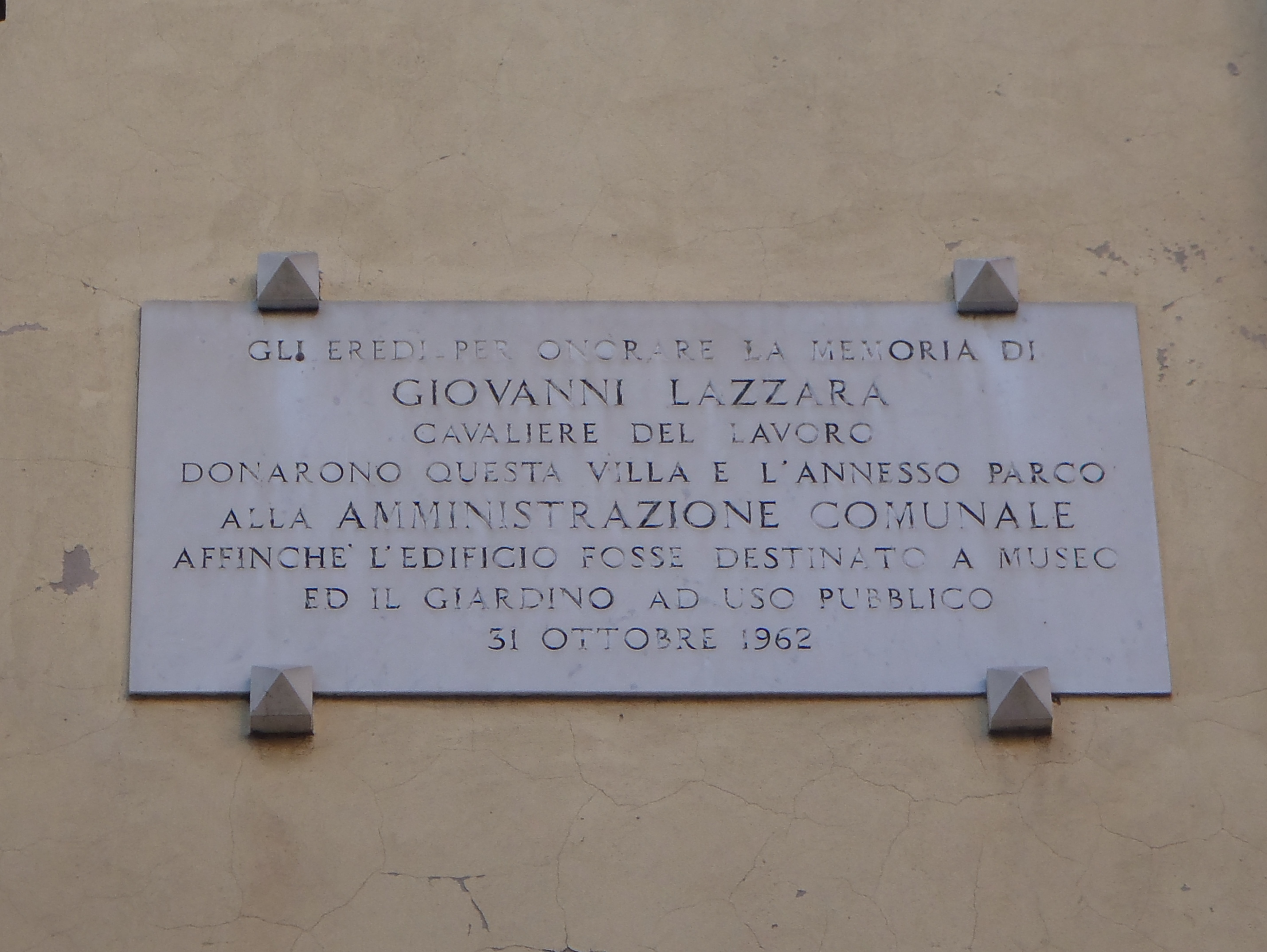 Targa commemorativa della donazione di Villa Maria (Livorno)